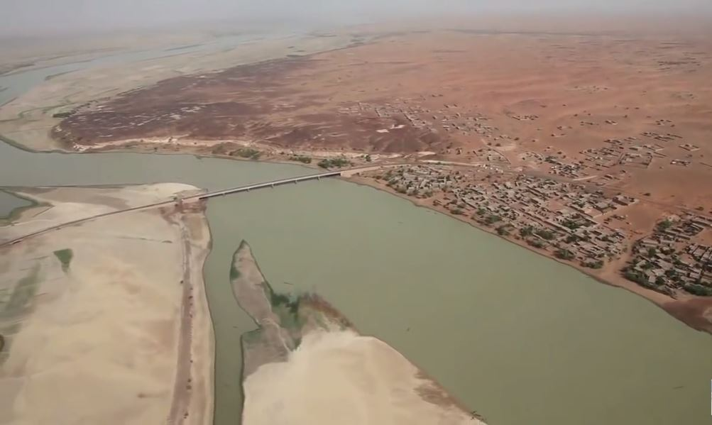 Vue aérienne du pont de Wabaria, près de Gao, au Mali, en août 2014.